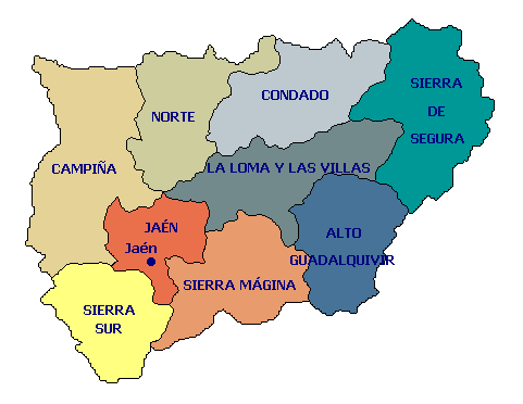 Mapa de Jaén (España) y sus distintas comarcas.